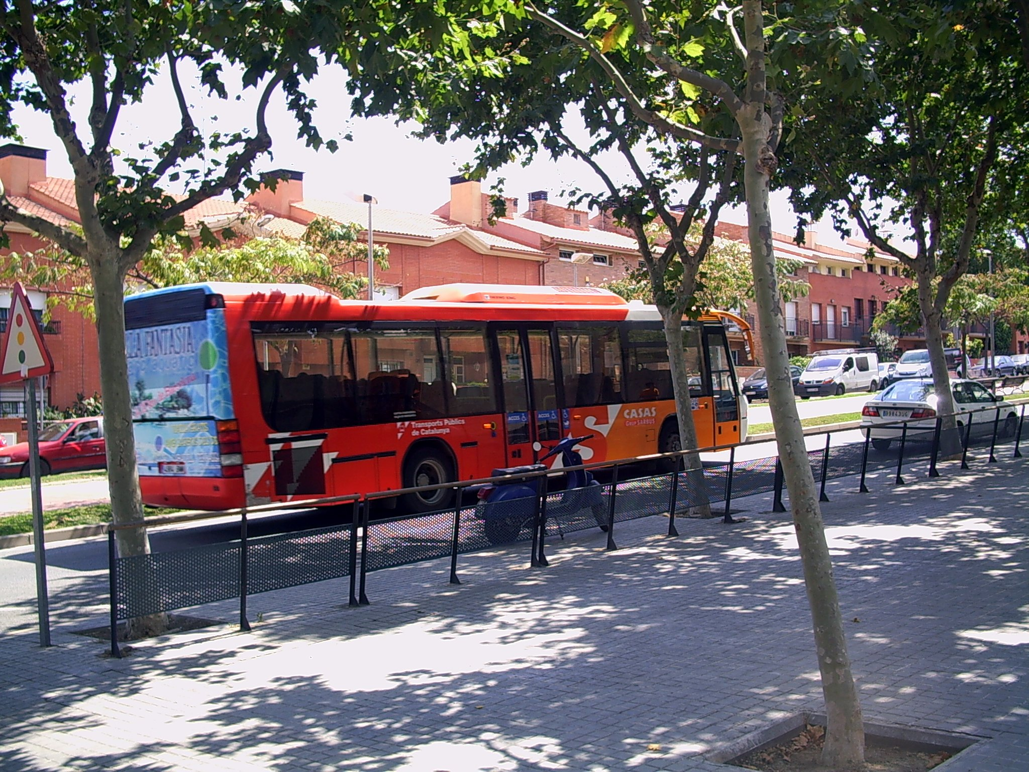 Autobus públic, a Vilassar de Mar, Catalunya, comarca del Maresme.